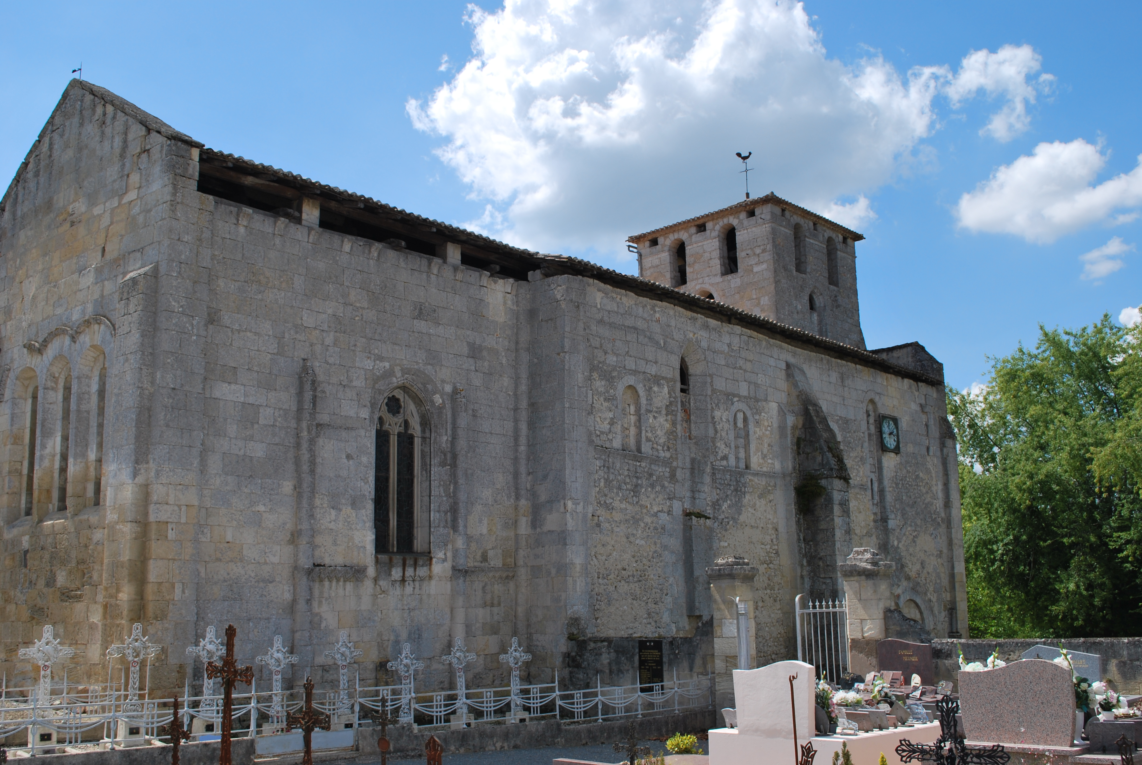 Fronsac église Saint-Martin Chapiteau choeur 1